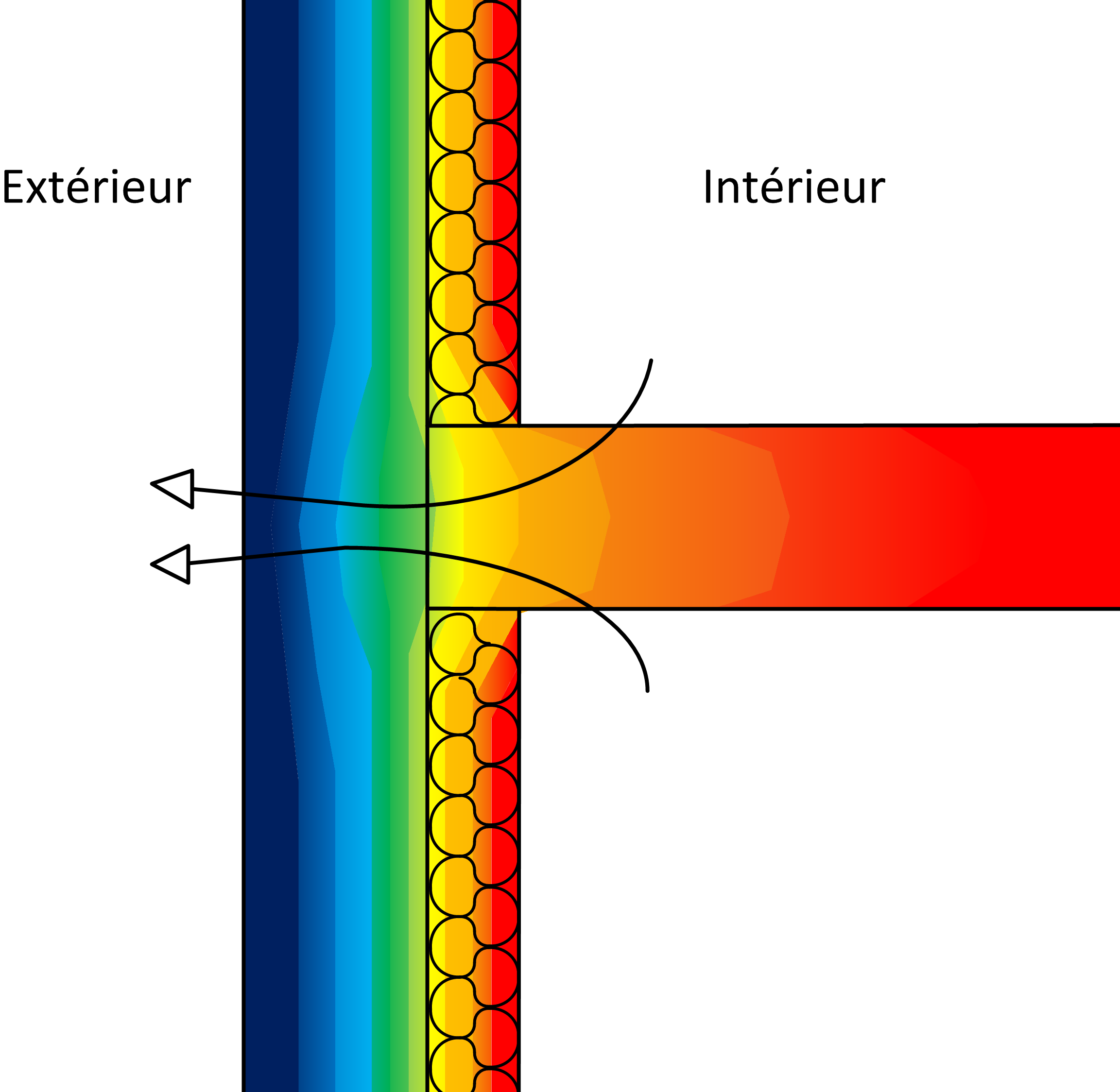 1.3-profil sans rupteur